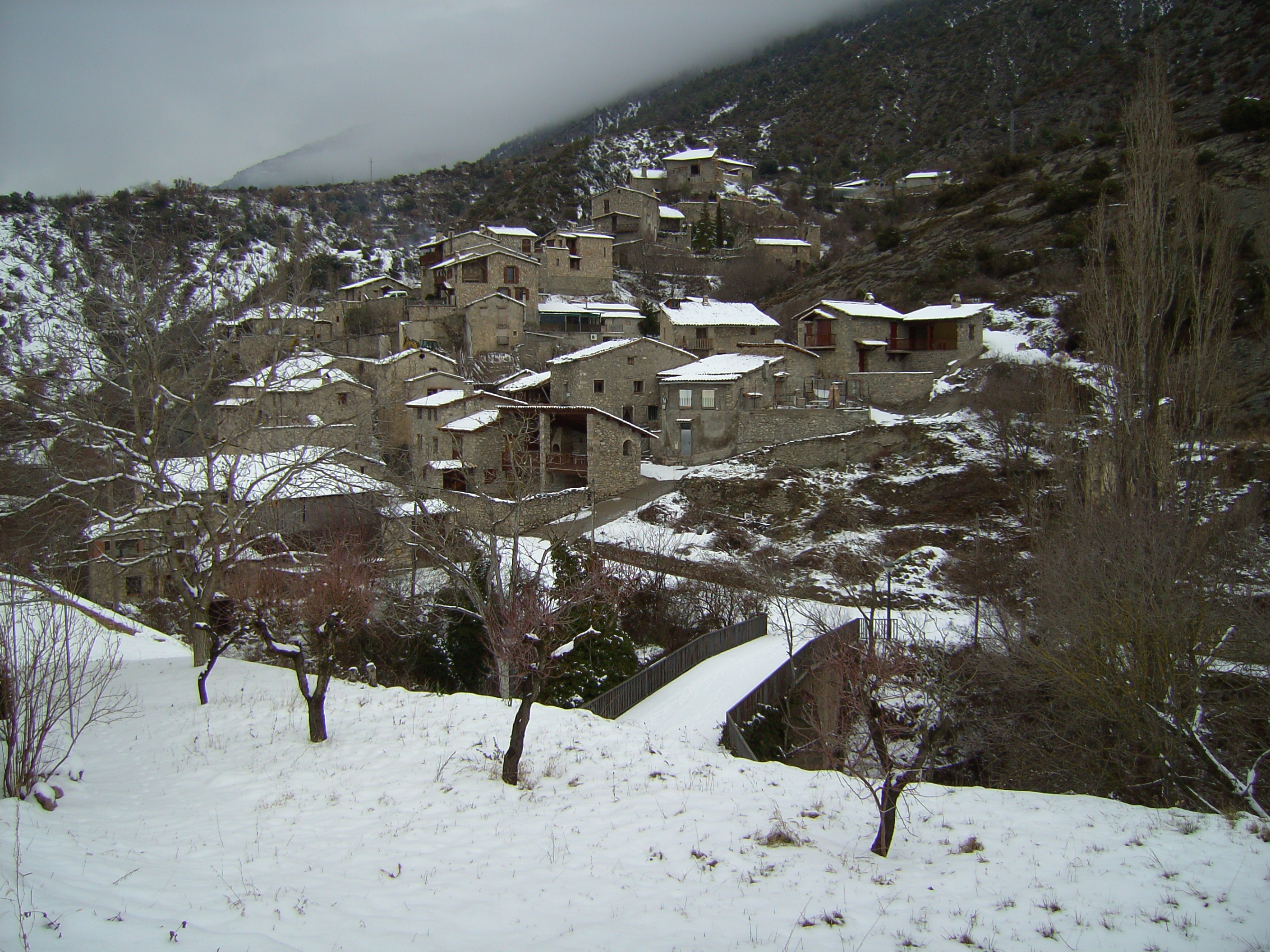 Fotografia del poble de Cabó